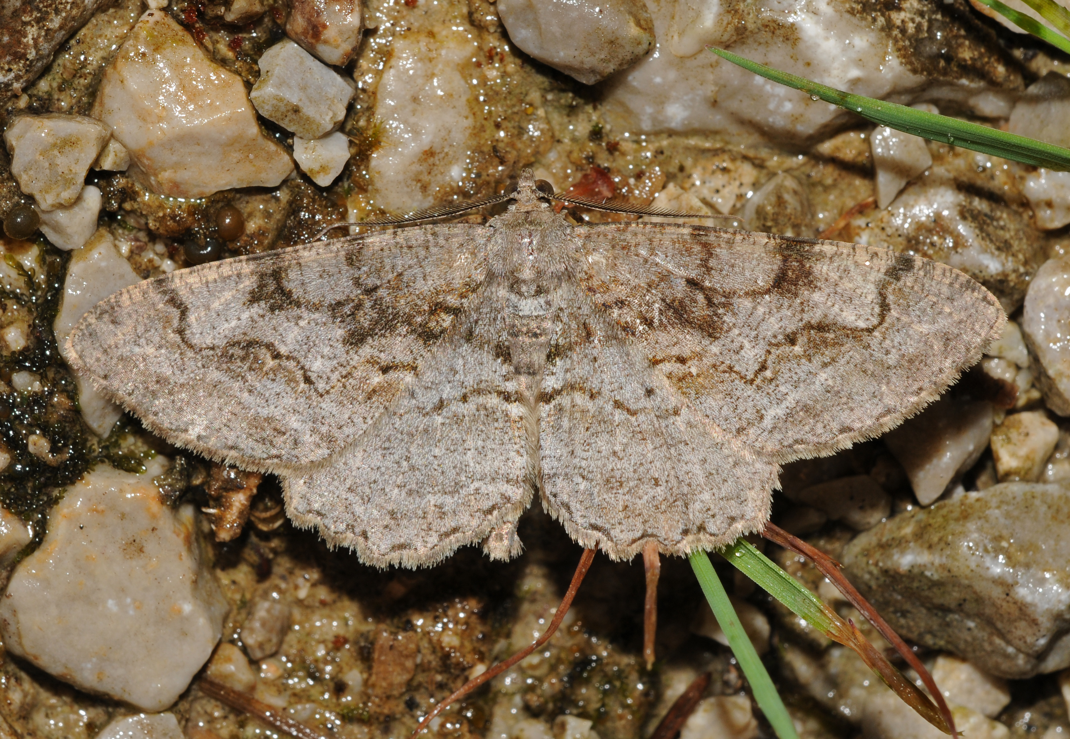 Alcis repandata